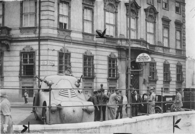 Polizeipanzerauto auf dem Ballhausplatz.